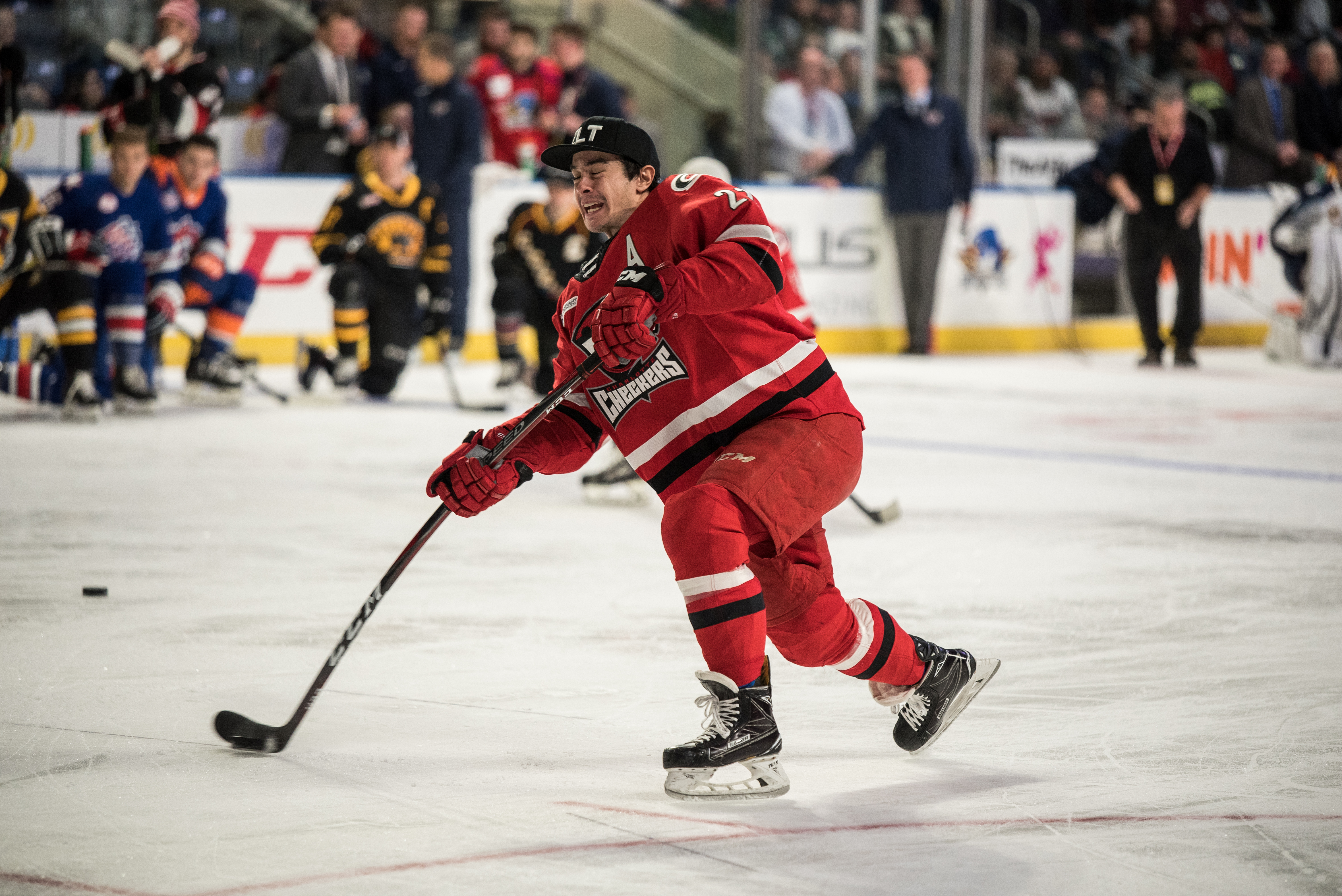 CYW_1799